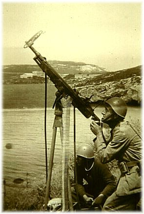 mitragliatrice colt-browning antiaerea